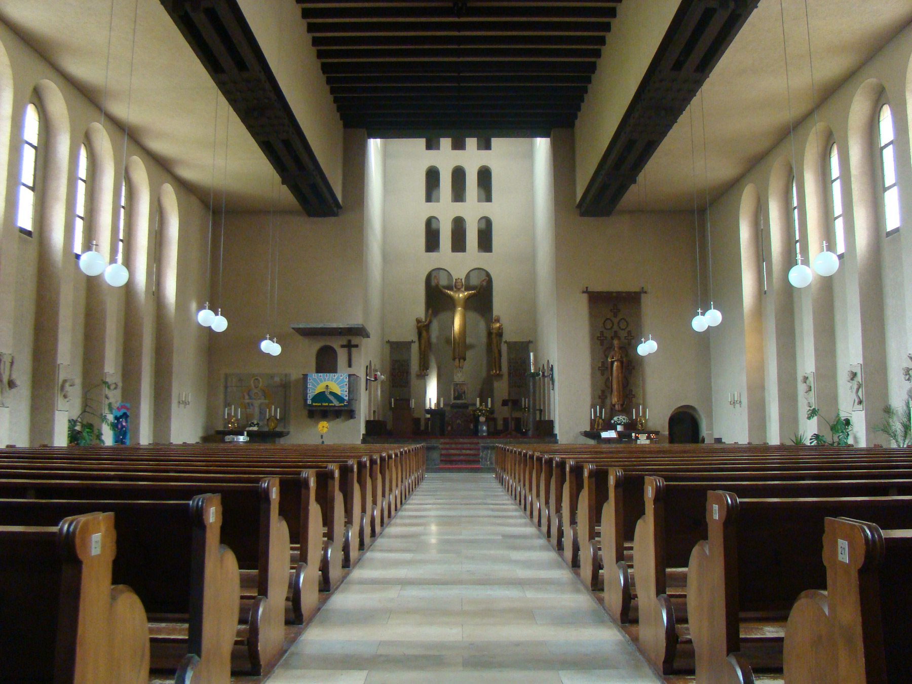 St. Cäcilia in Mosbach